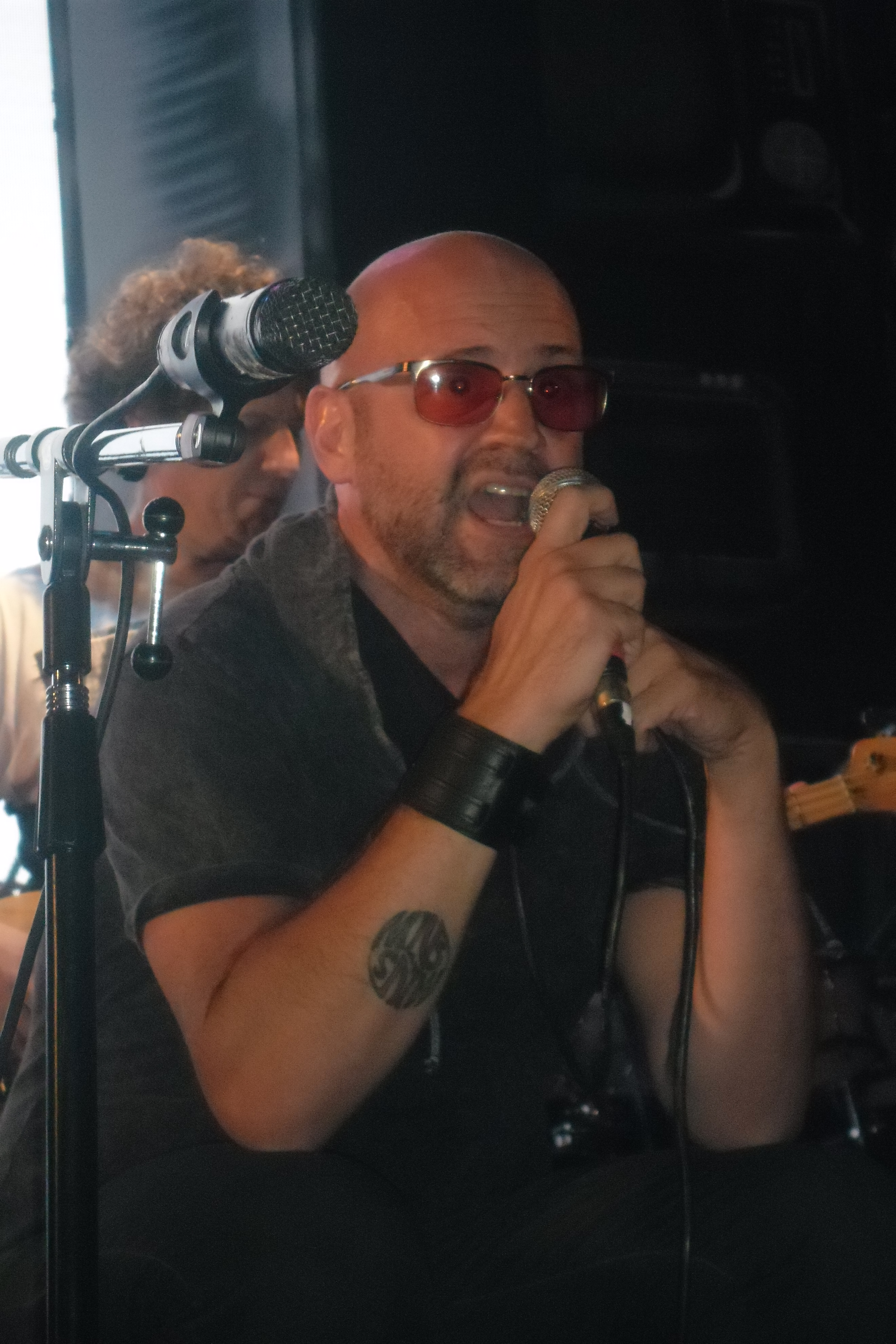 Leandro Vilariño en vivo.